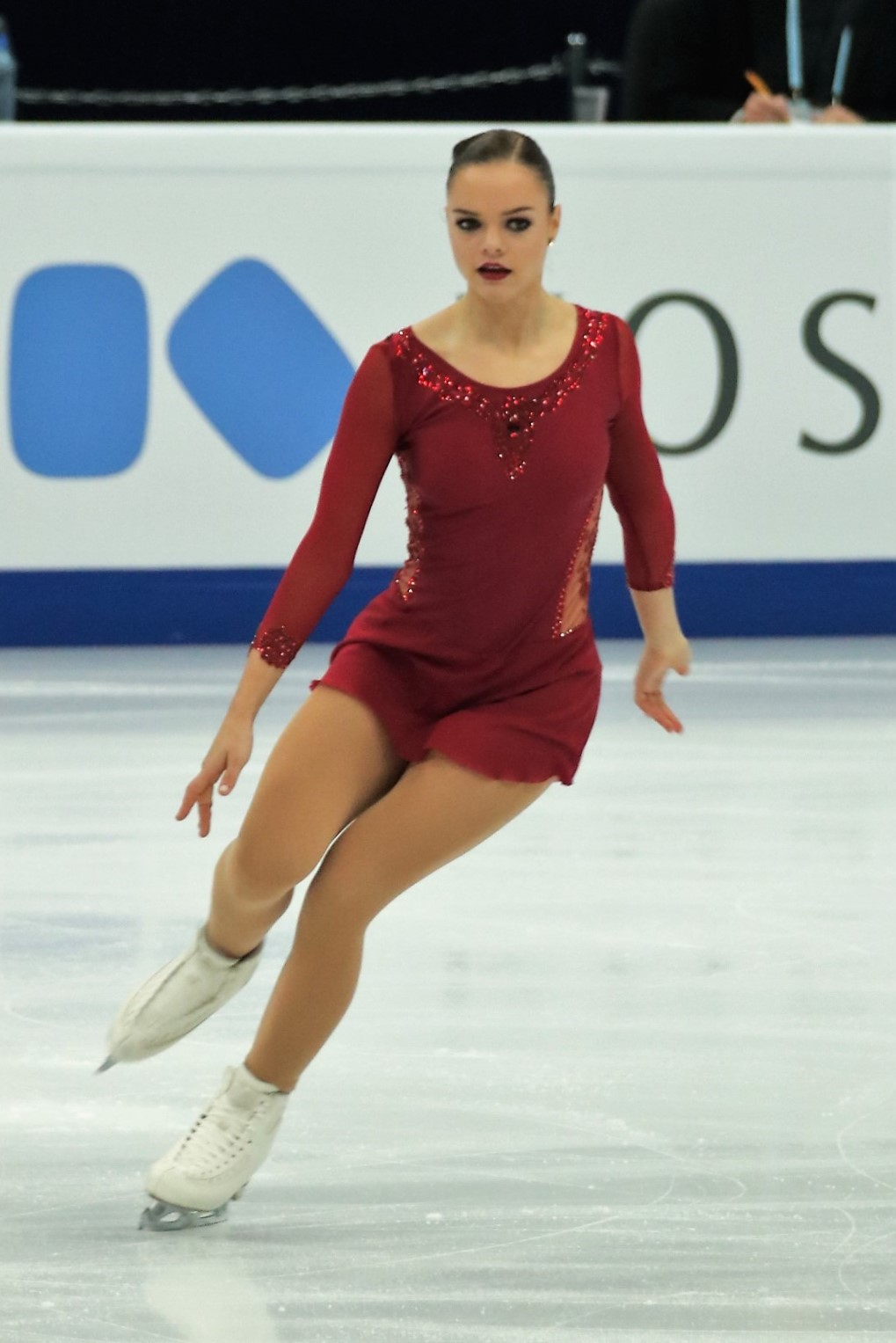 Луна Хендрикс (Бельгия) на Чемпионате Европы по фигурному катанию 2018.